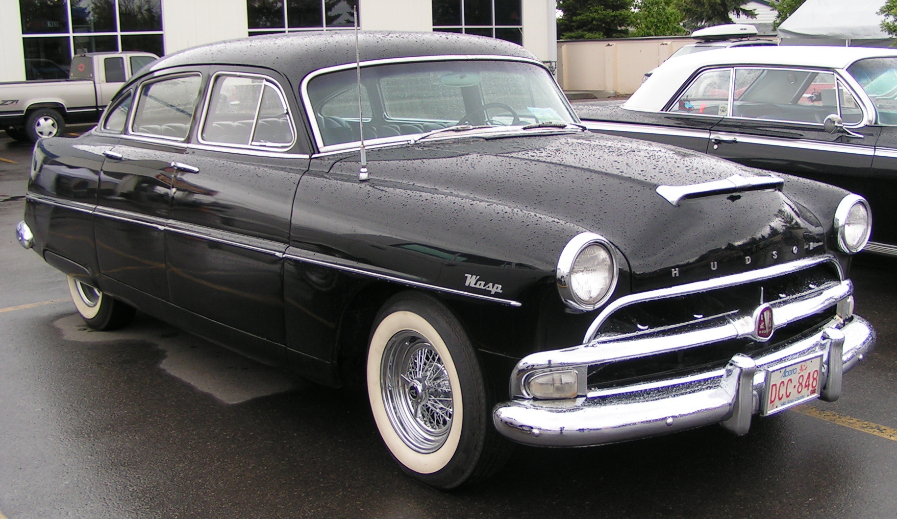 1954 Hudson Wasp 4 door Sedan